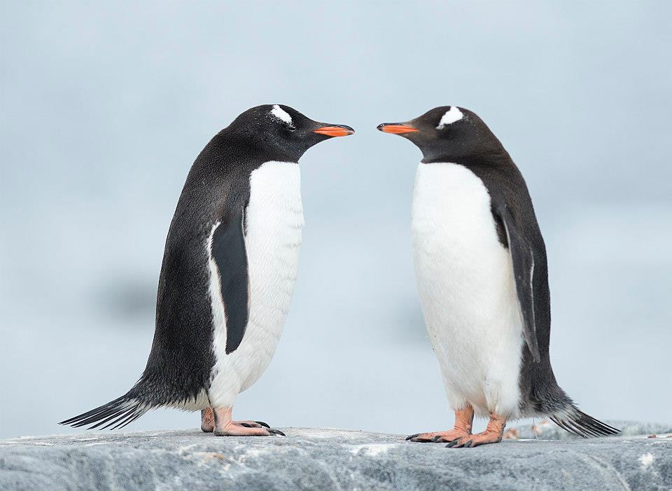 Hello! Hello!